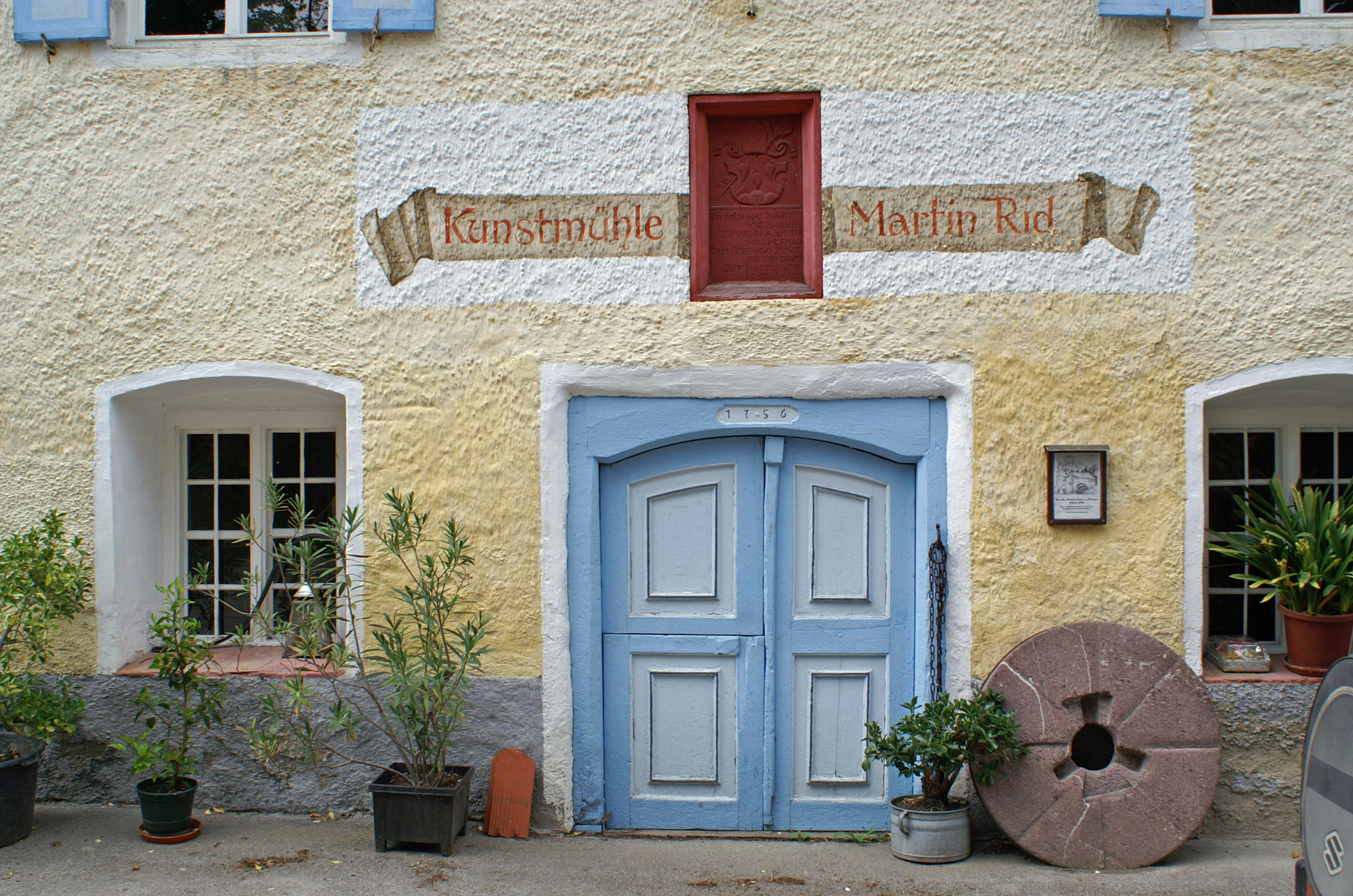 Mühle an der Wertach in Pforzen